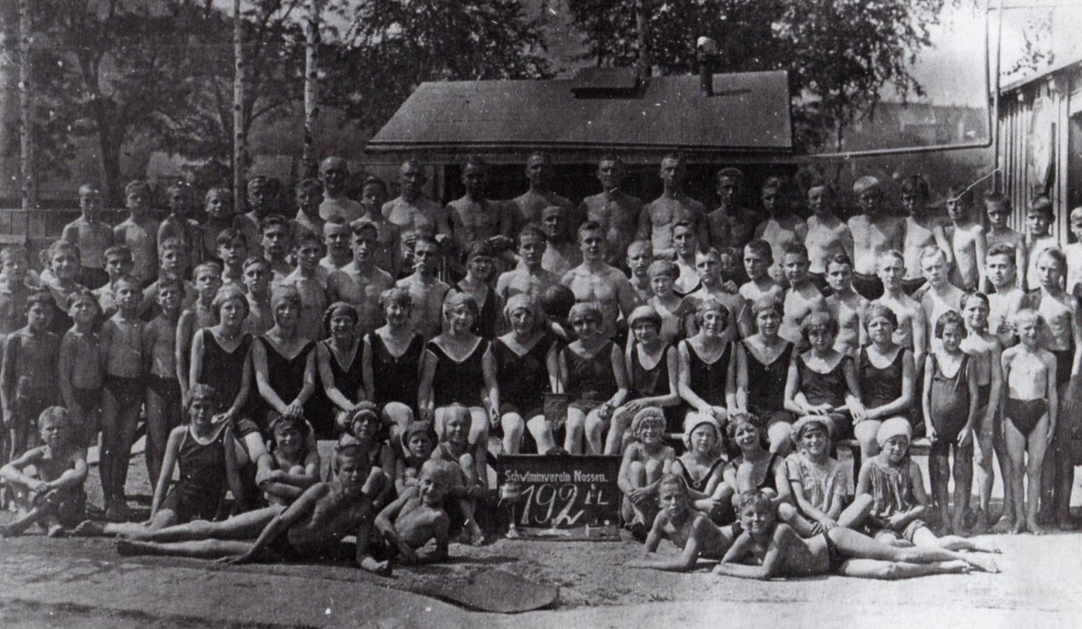 Gruppenbild Schwimmverein Nossen 1924